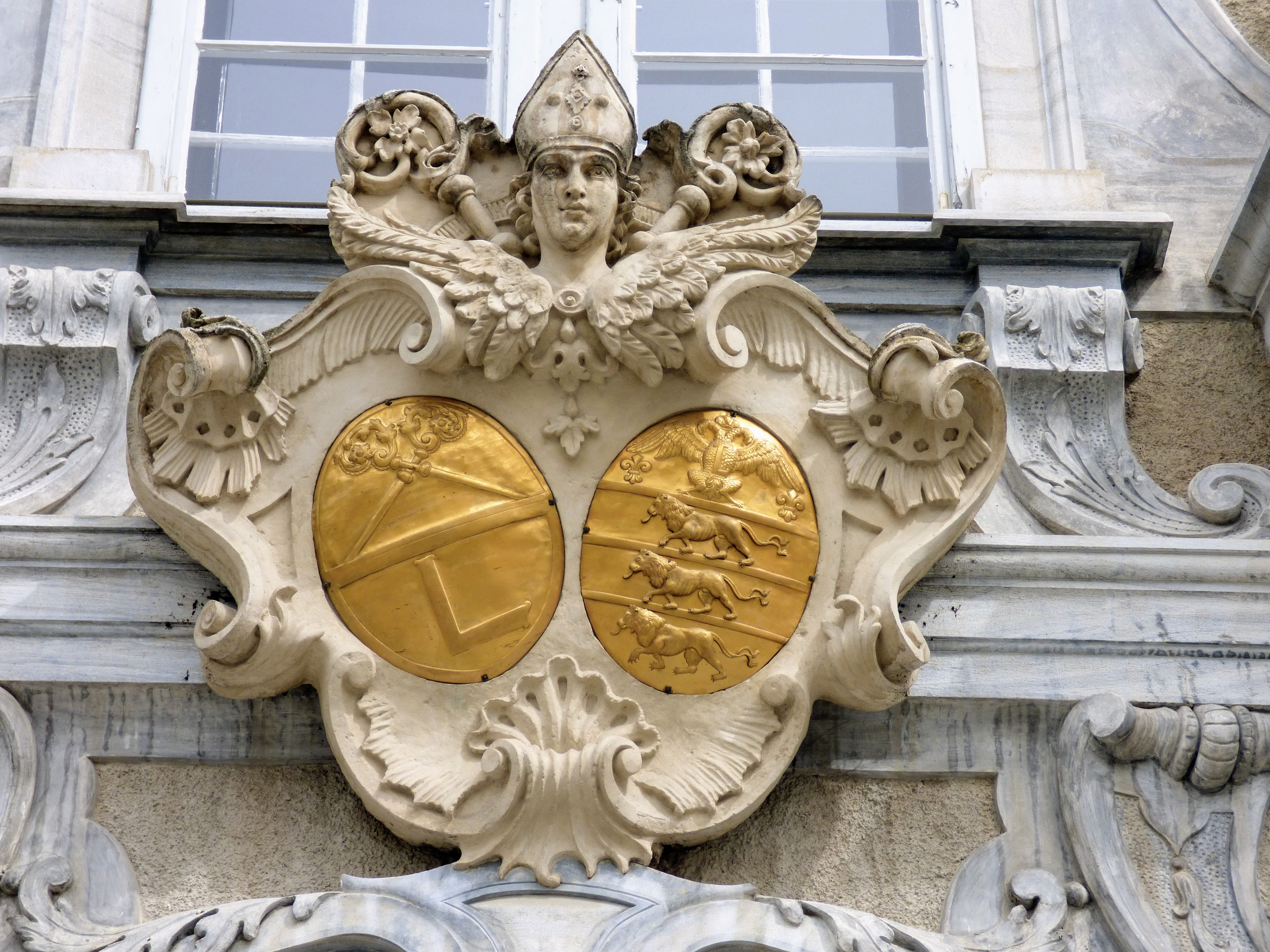 Wappen von Abt Eugen Graf Inzaghi über dem Portal des Stifts Sankt Lambrecht